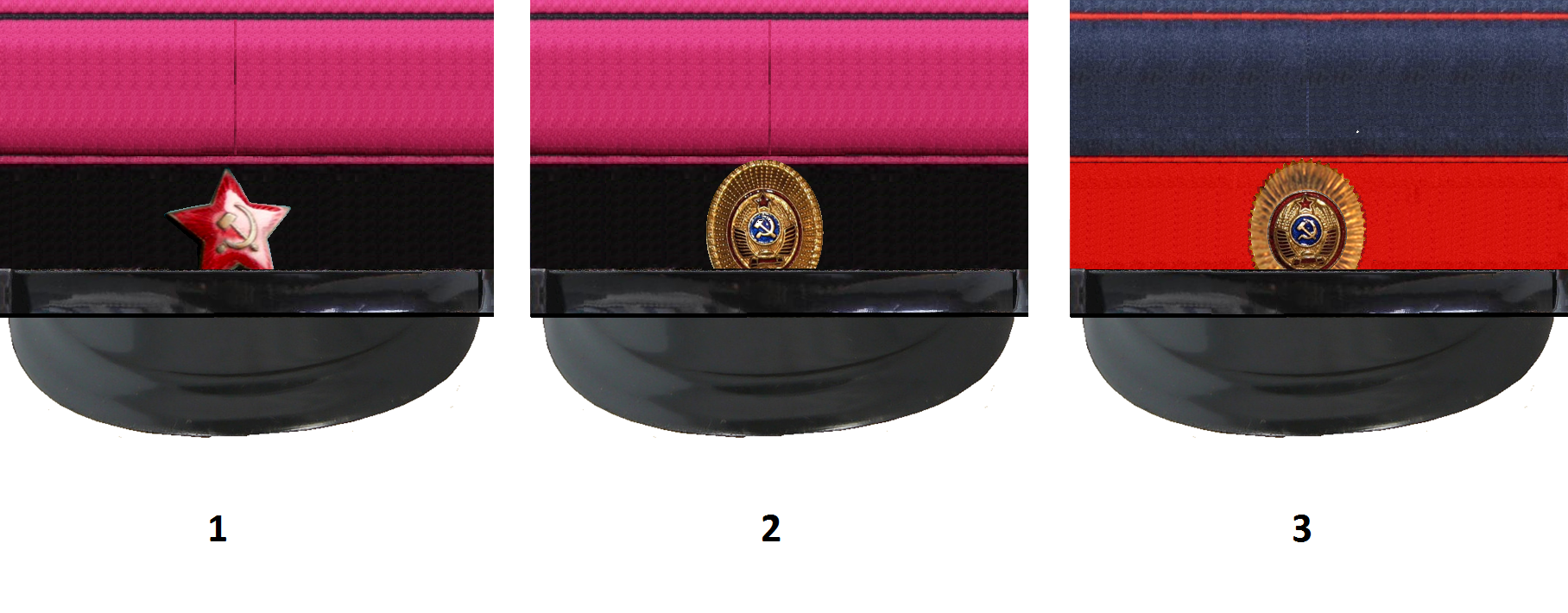 Фуражки милиции